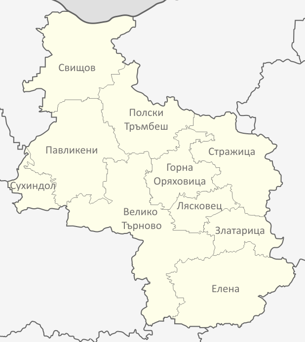 Картата е създадена от Любомир Таушанов